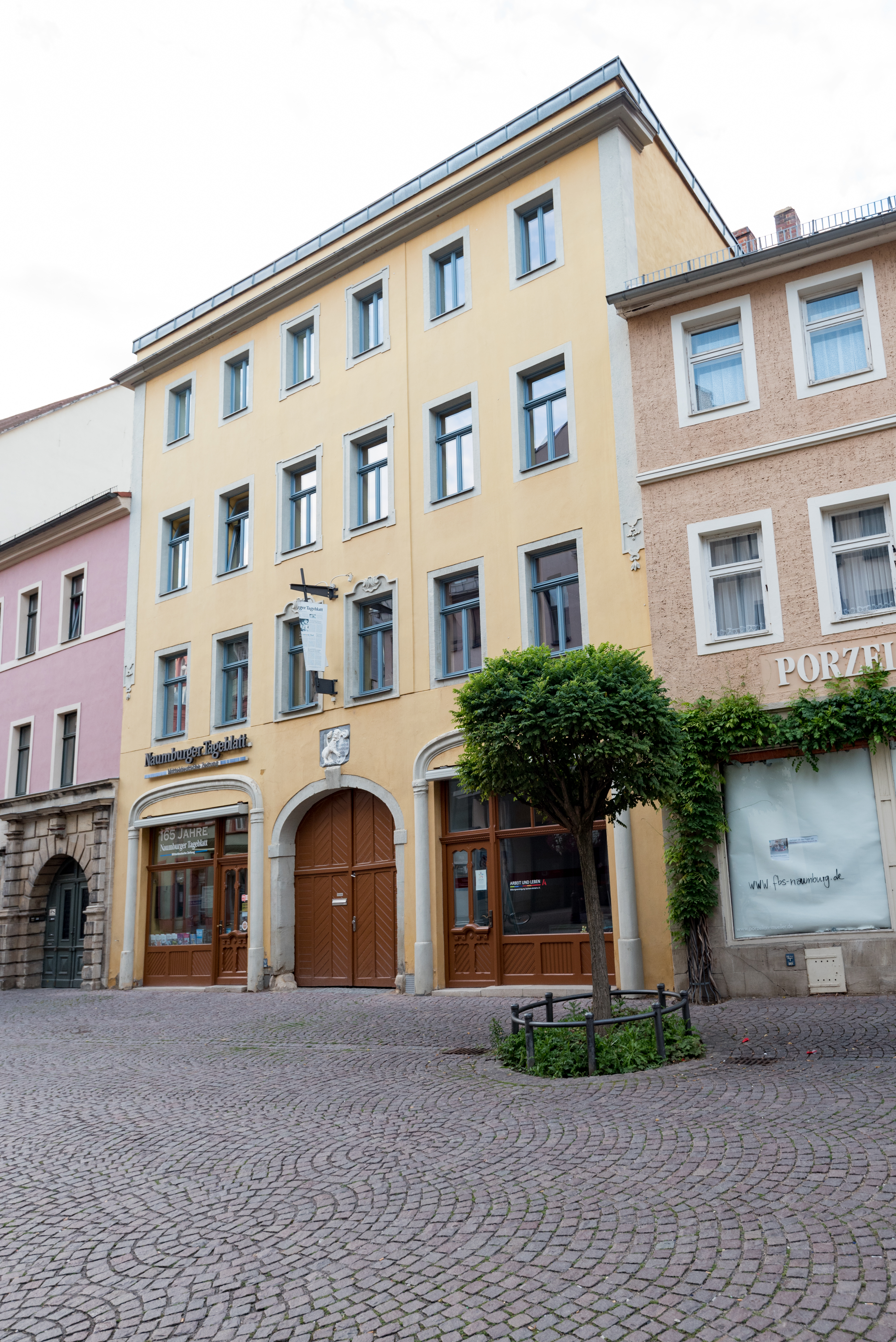 Naumburg (Saale), Salzstraße 8